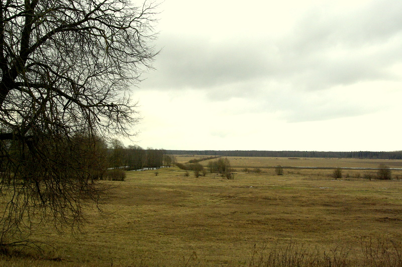 Vaade Laagna mõisast raudtee suunas ehk lõunasse.